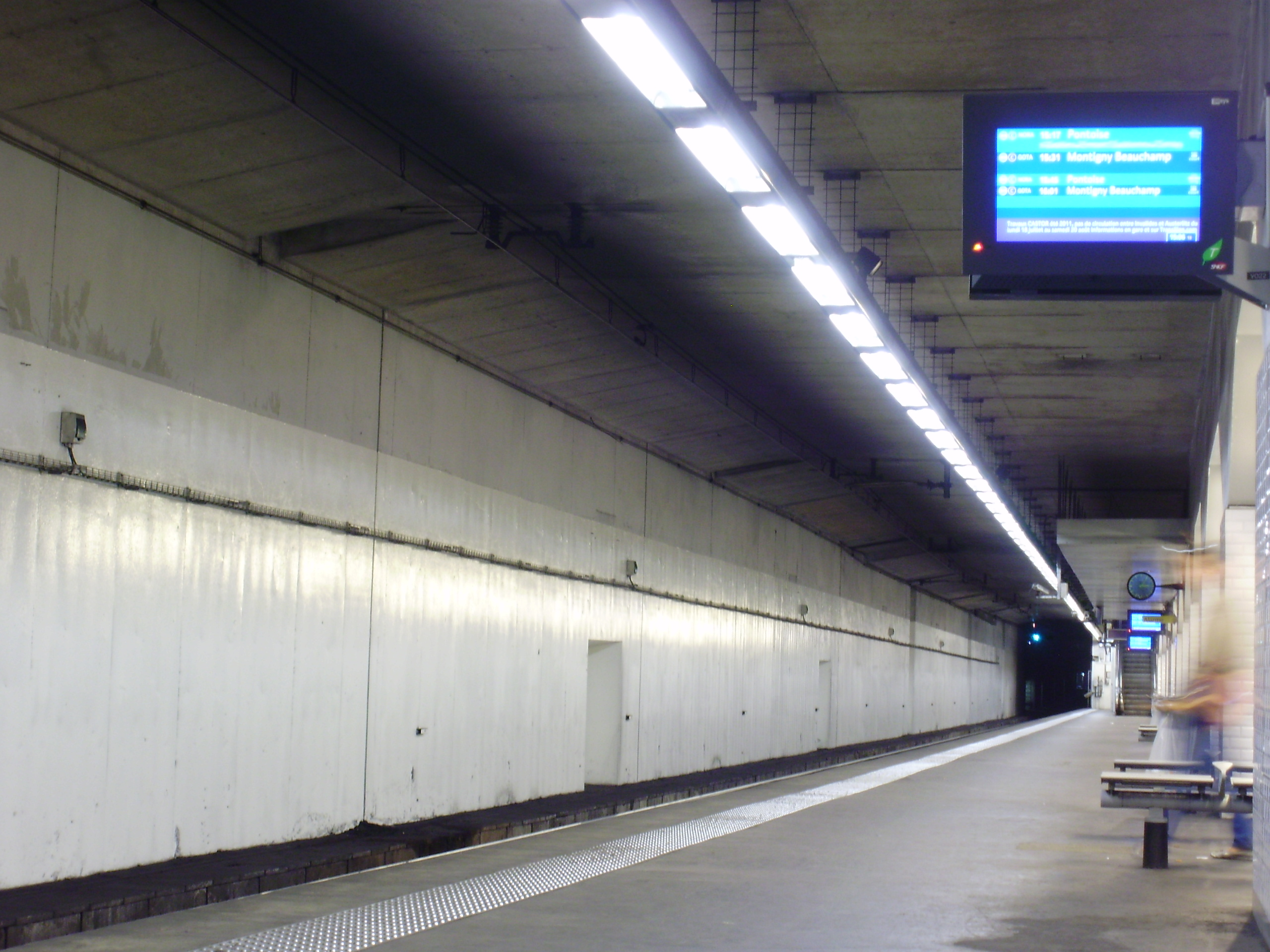 Gare de Saint-Ouen, Seine-Saint-Denis, France : quai pour Pontoise